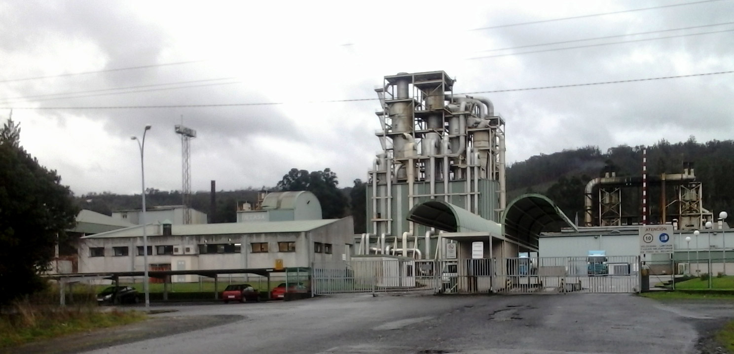 Fábrica de Intasa en San Sadurniño A Coruña